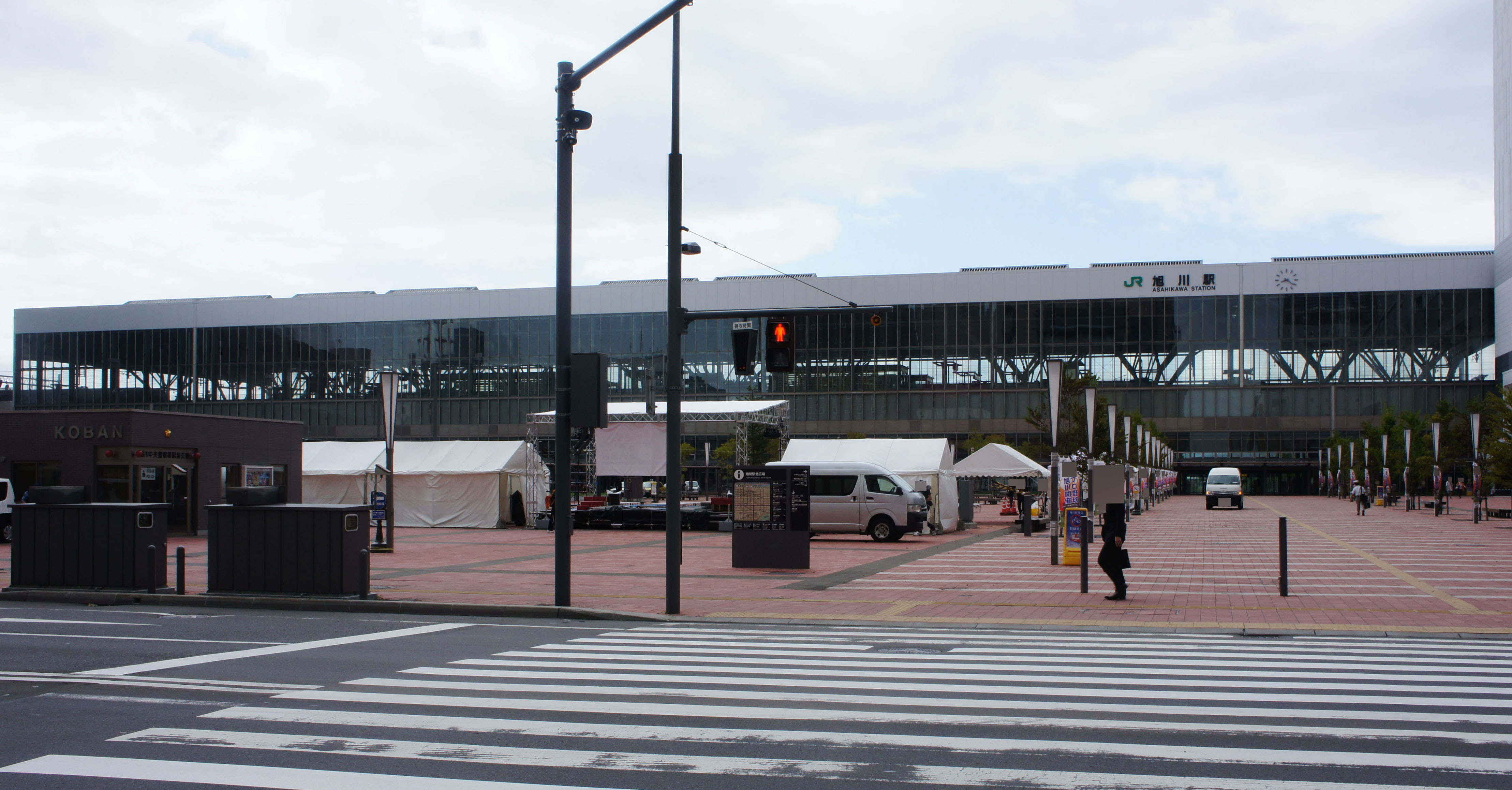 JR旭川駅の北口駅舎